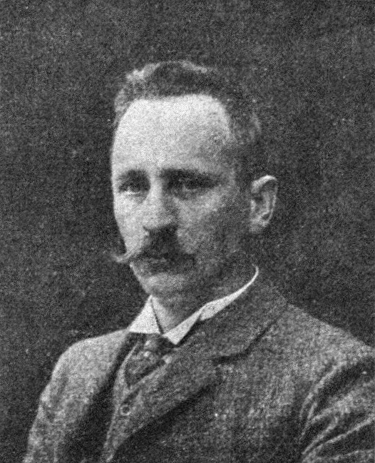 Österreichischer Politiker, Reichsratswahl 1907, Name siehe Dateiname